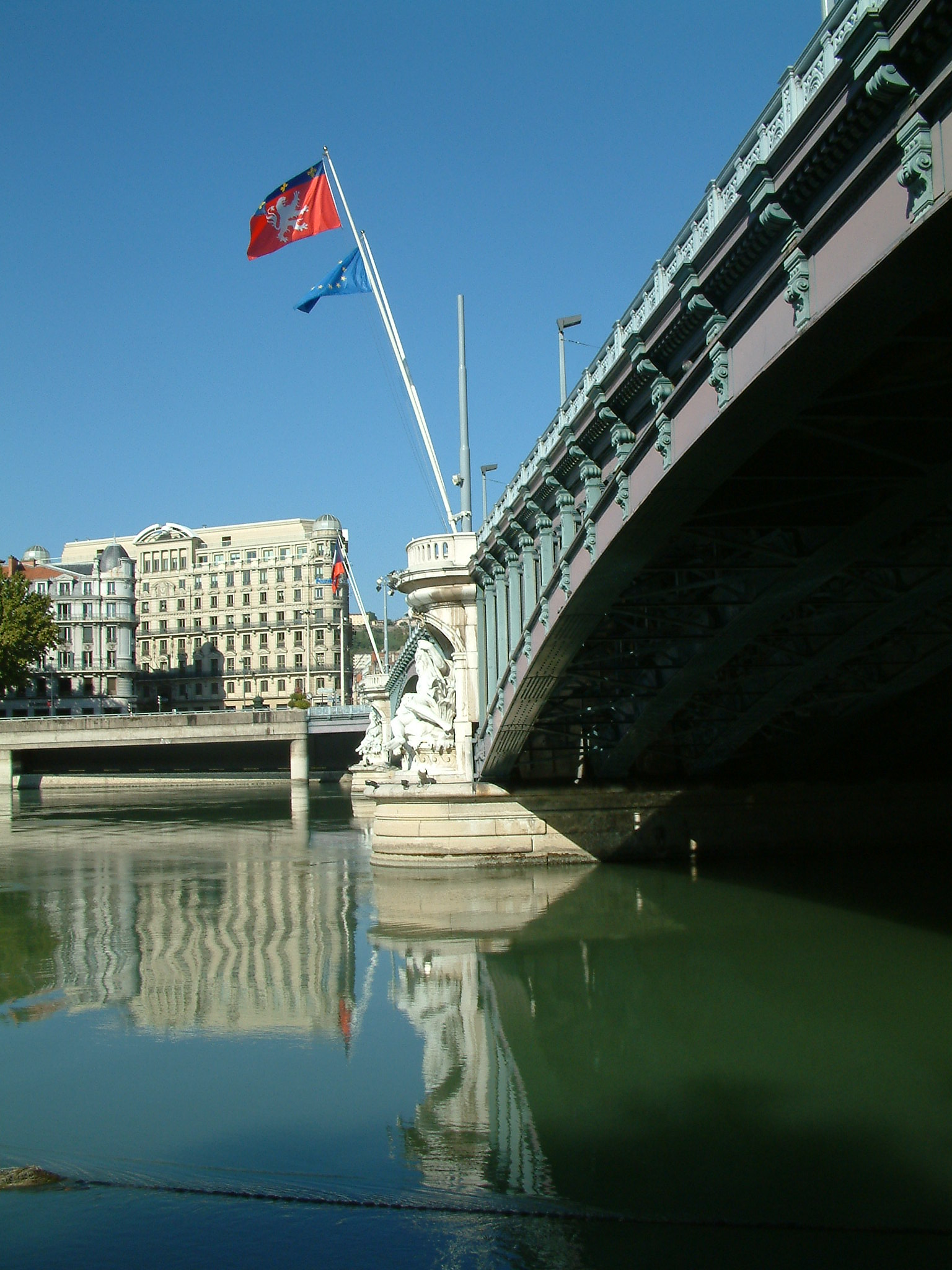 Le pont Lafayette, à Lyon. Vue vers l'ouest depuis la berge Amalia Rodriguez (ou berge reine Astrid ?) en rive gauche, côté aval. Le quai en face est le quai Jules Courmont, mais le grand immeuble blanc à huit étages est au n° 2 rue du Président Carnot.